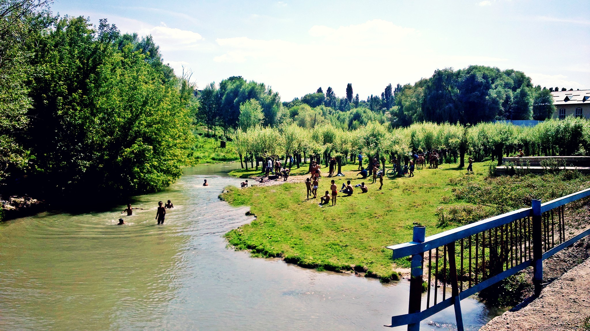 Oʻzbekcha/ўзбекча: Amir.Temur